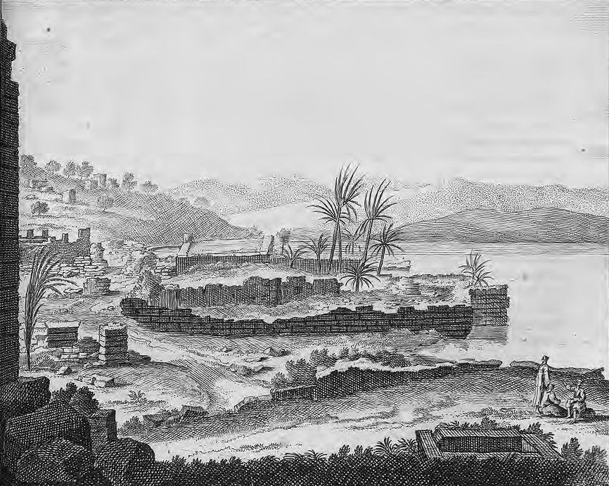 [Voyage au Levant. Pl. en reg. p.320 : Voyage de Nazareth à la mer de Galilée. Le lac de Tibériade.] Viste (...). [Cote : Réserve A 200 293]